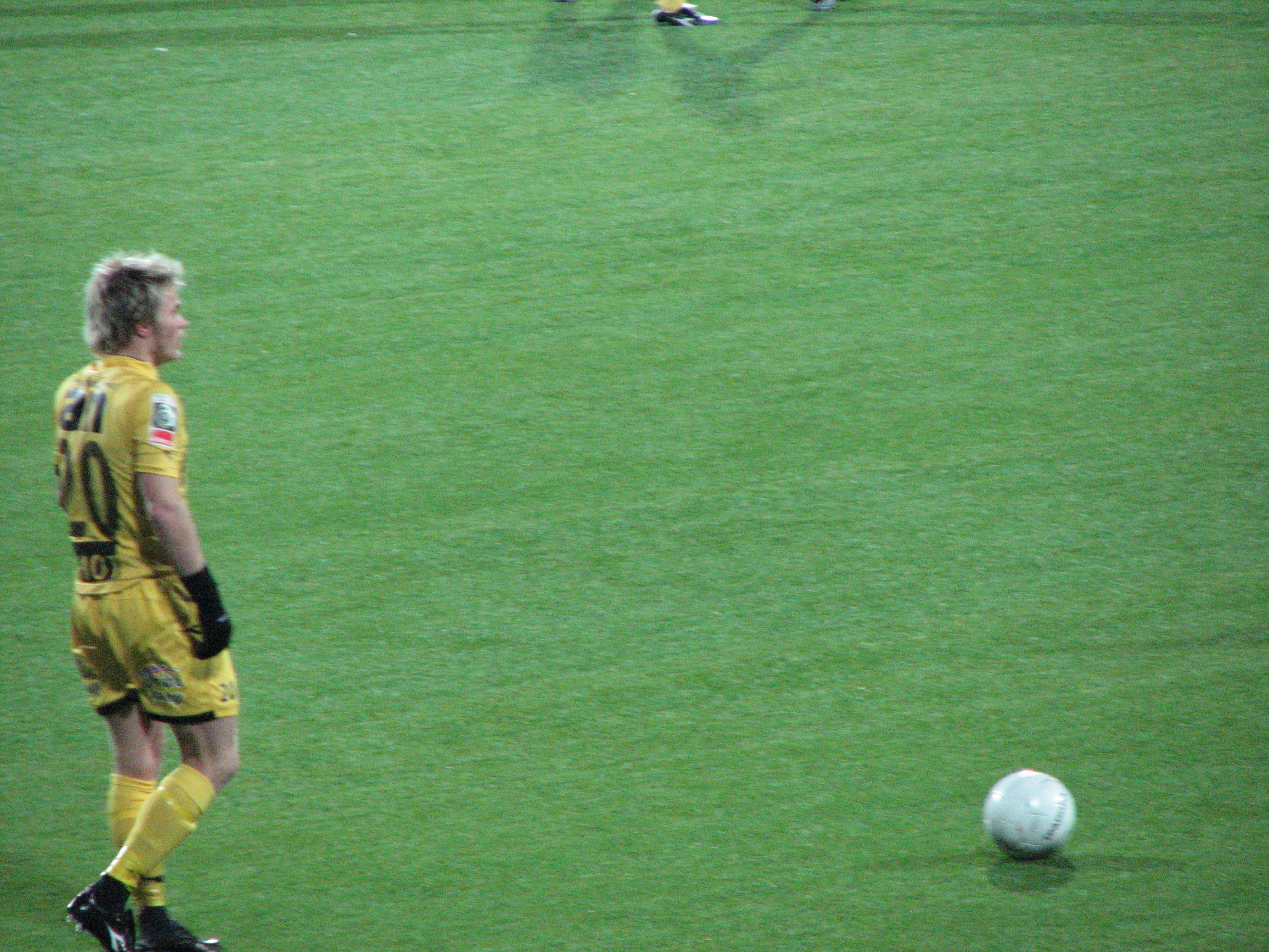 Tippeligakvalifiseringen mellom Bodø/Glimt og Odd Grenland. Frispark av Trond Olsen etter ca. 10 minutter